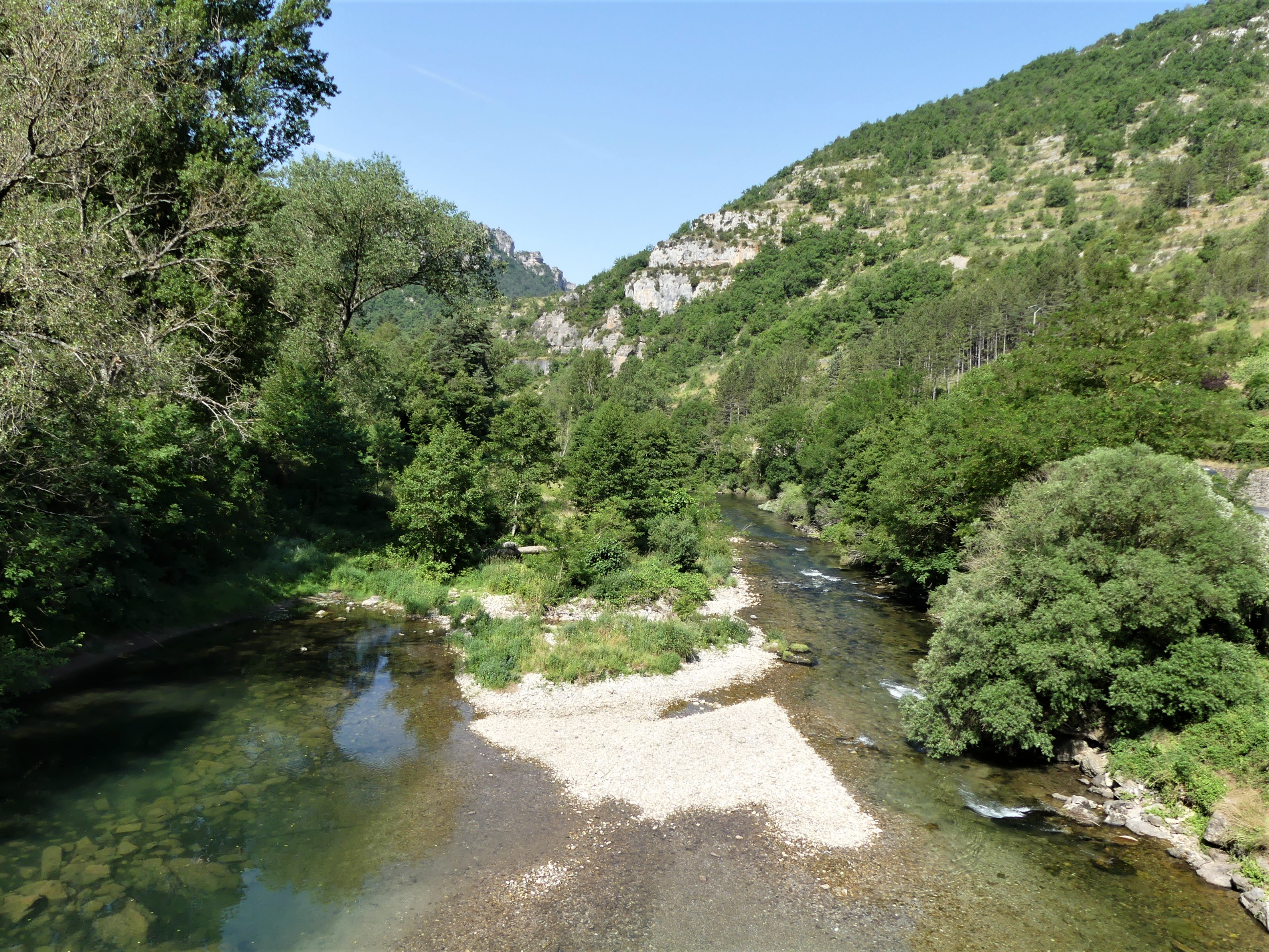 Les gorges de la Dourbie vues depuis le pont de La Roque-Sainte-Marguerite, Aveyron, France. Vue prise en direction de l'aval.